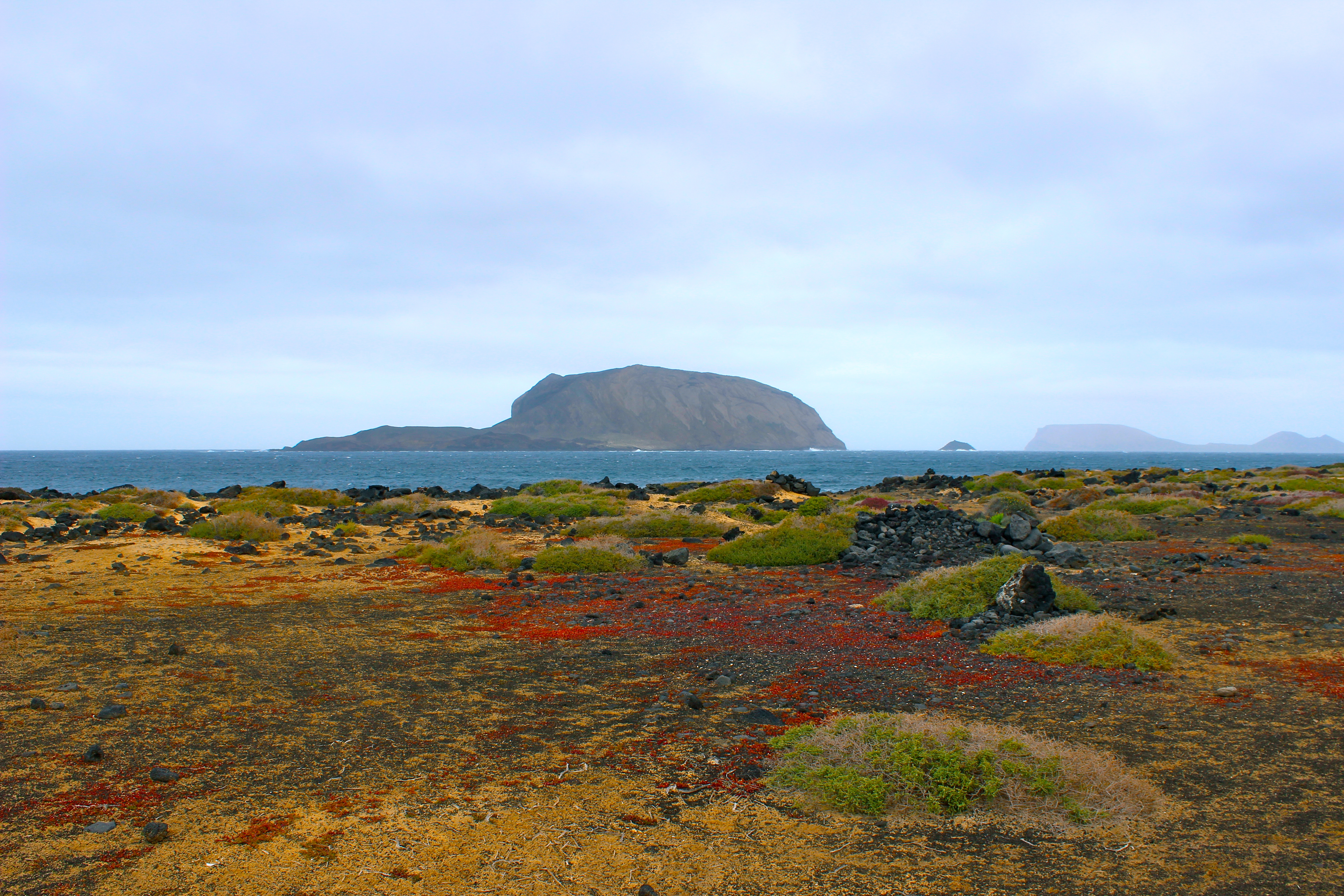 Die Insel Montana Clara von La Craciosa aus betrachtet